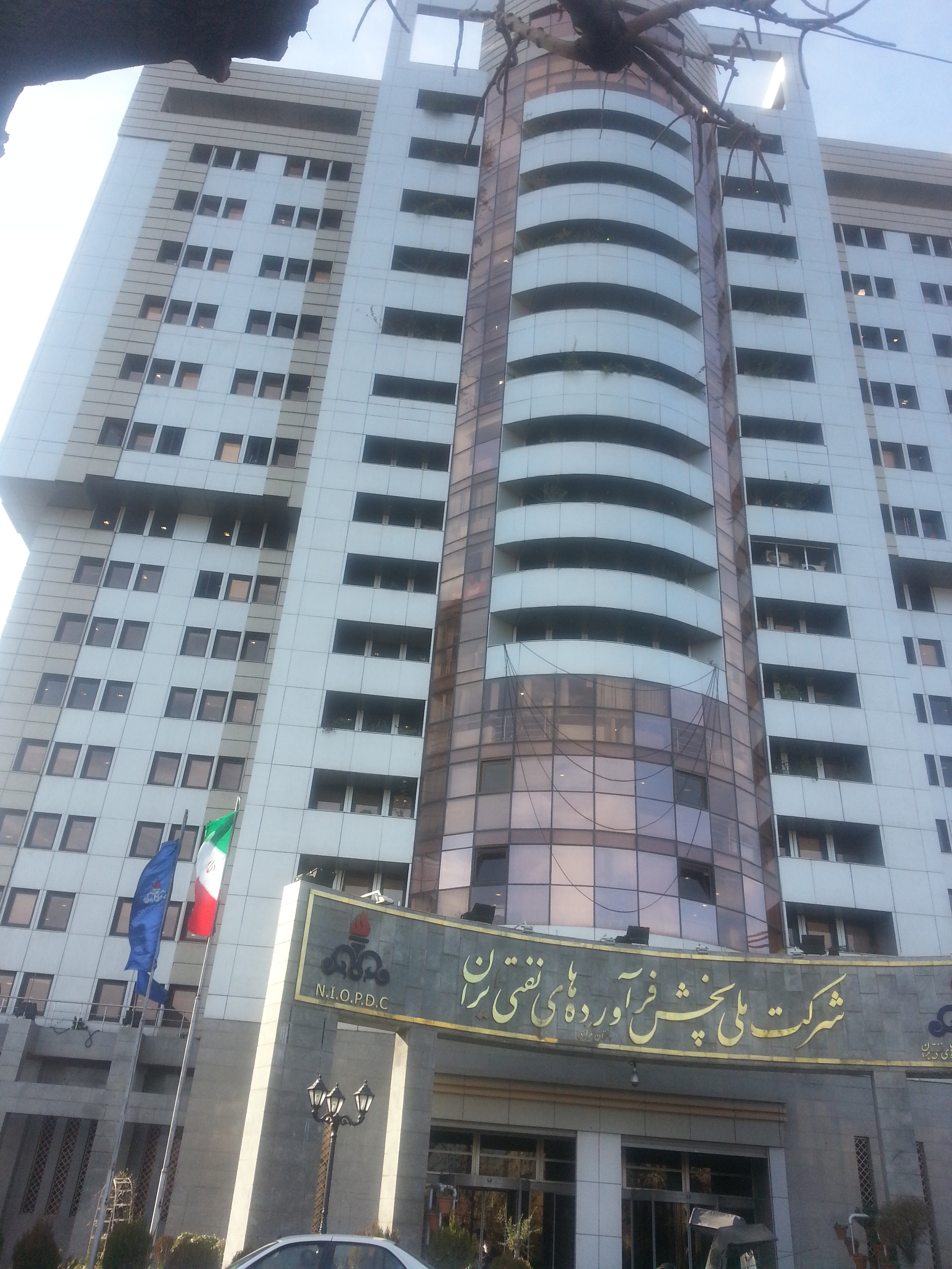 ساختمان مرکزی شرکت ملی پخش فرآوره های نفتی ایران در خیابان ایرانشهر تهران